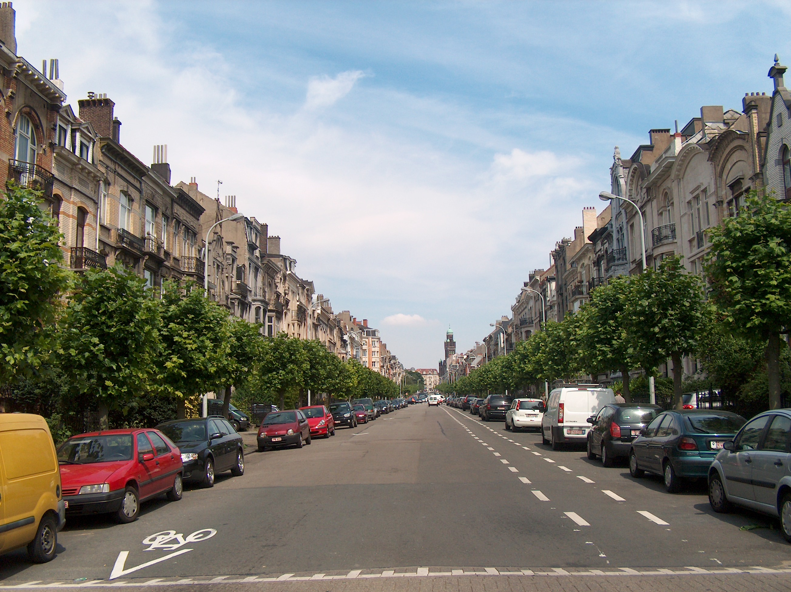 L'avenue Eugène Demolder à Schaerbeek, Bruxelles, Belgique.